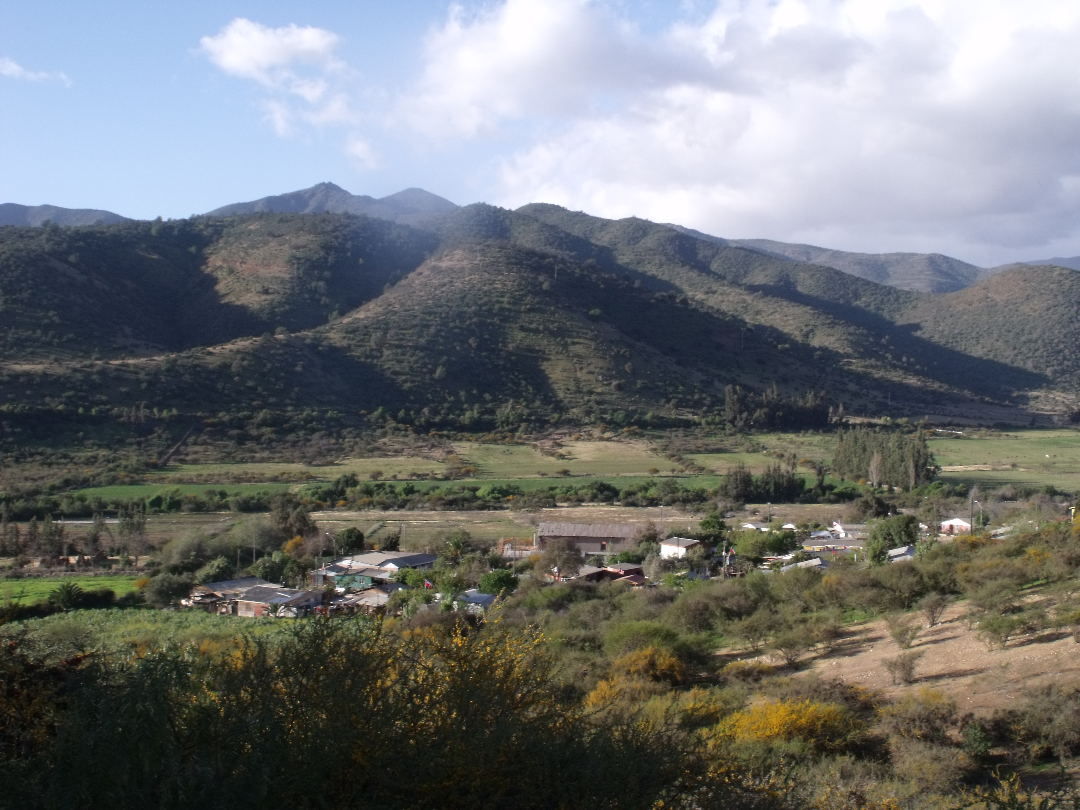 La aldea de Chuchiñi, Salamanca, Chile